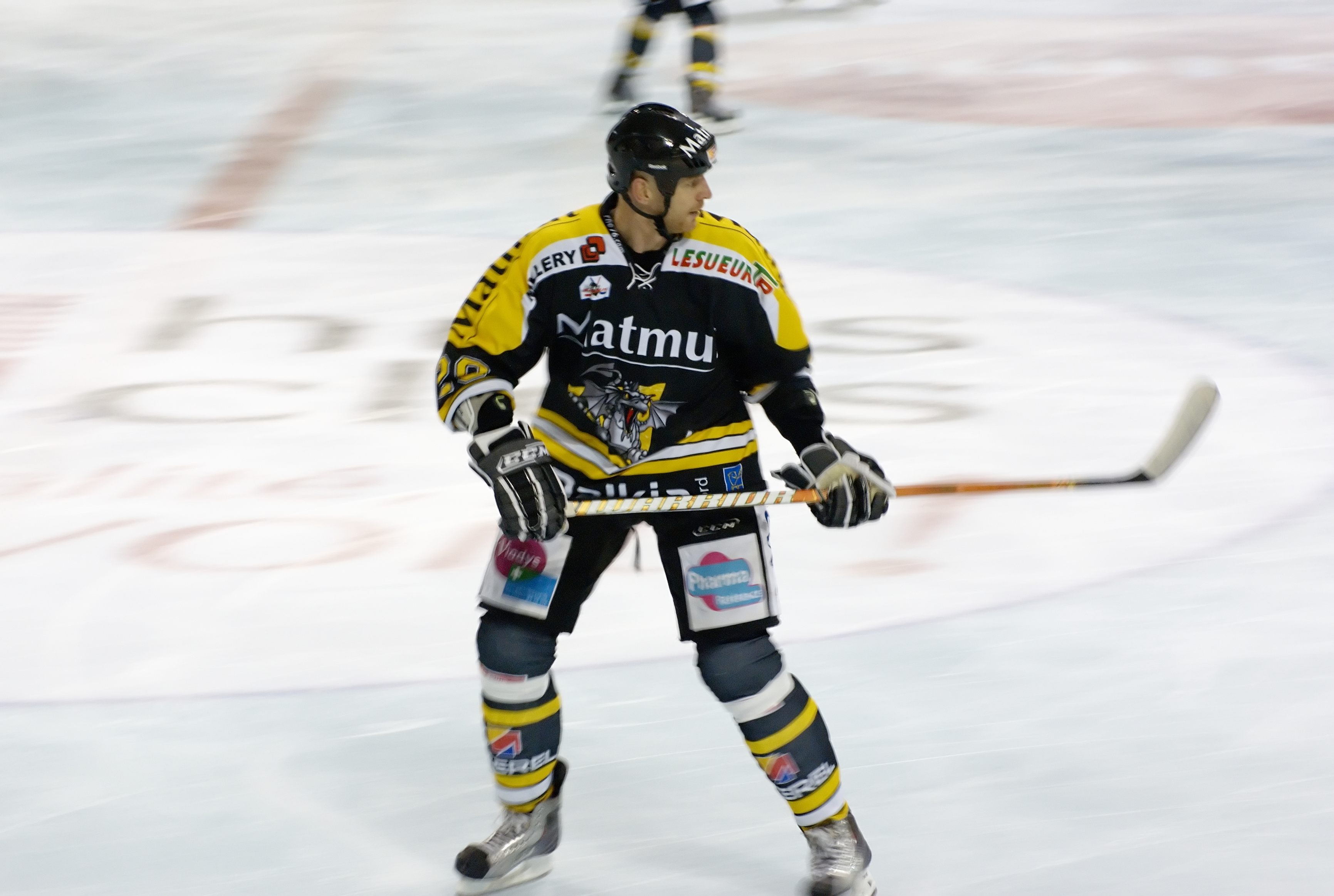 Daniel Babka lors du match de hockey Rouen-Angers du 20/10/2010 à la patinoire Guy-Boissière sur l’île Lacroix (6e journée de poule A de la coupe de la ligue).